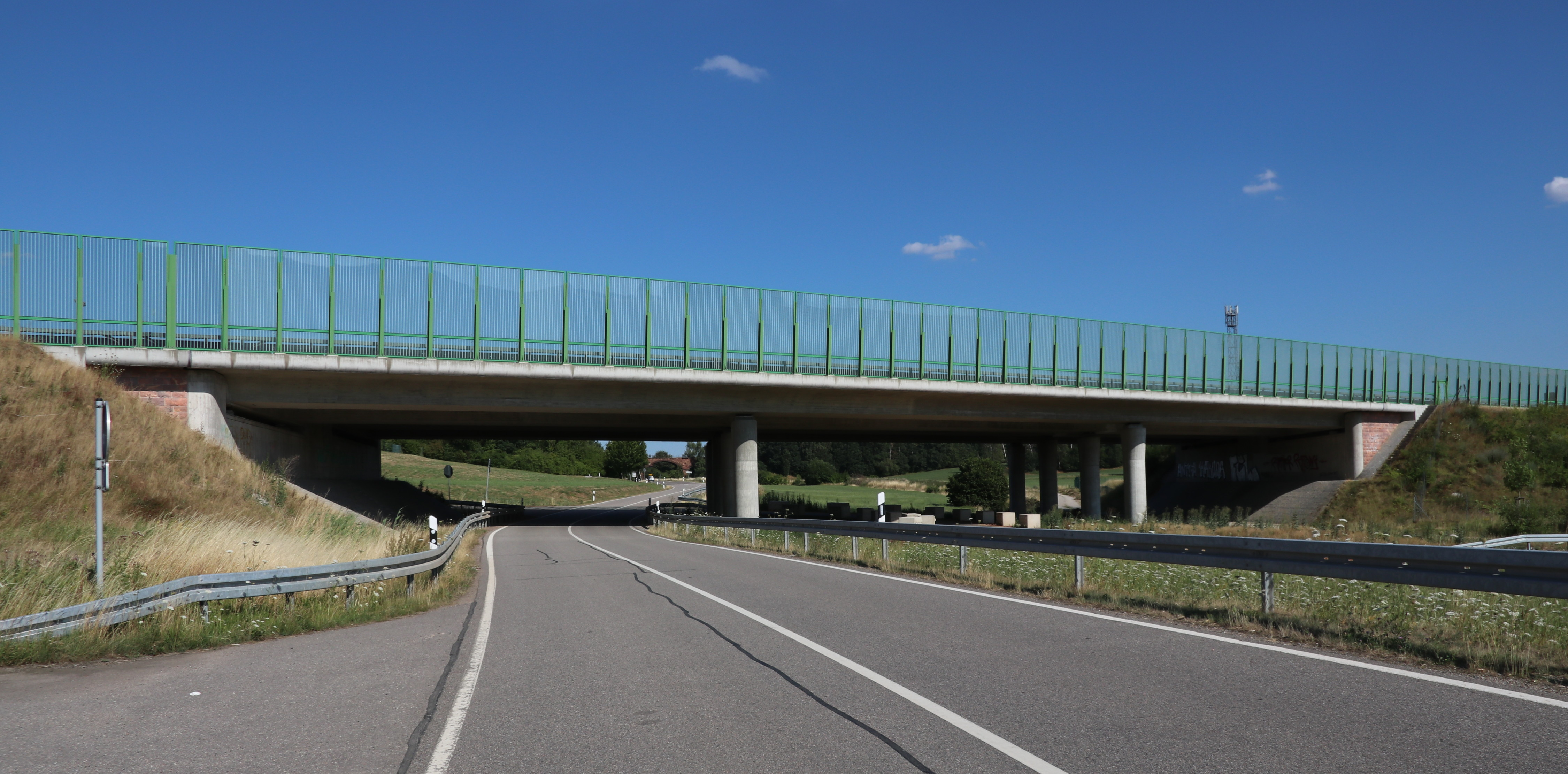 Brücke der BAB 72 über das Gewässer "Ratte" und die K 8260 bei Rathendorf; im Hintergrund das Viadukt Obergräfenhain der ehemaligen Bahnstrecke Rochlitz–Penig